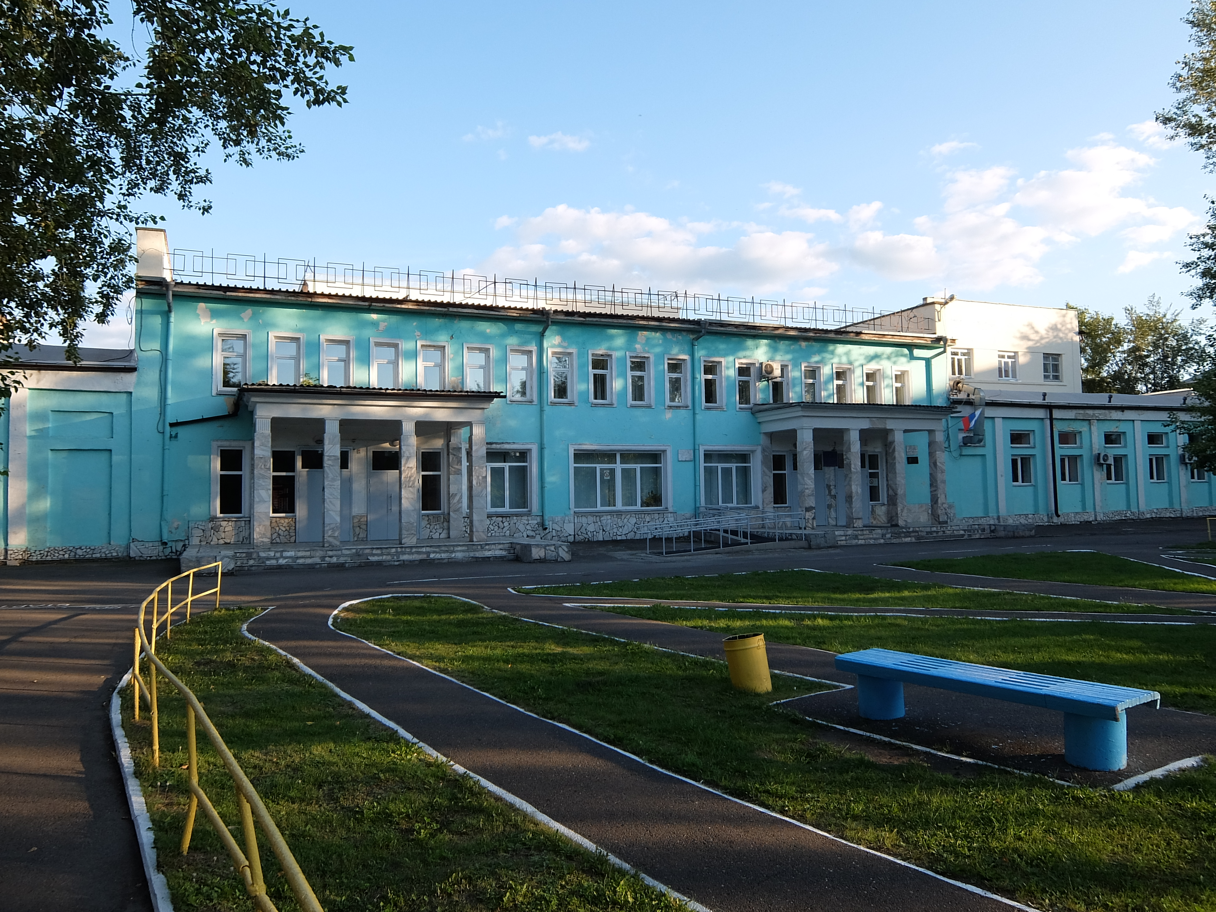 Здание первой каменной школы красноярского правобережья. Построена в 1935г. на средства завода Красмаш